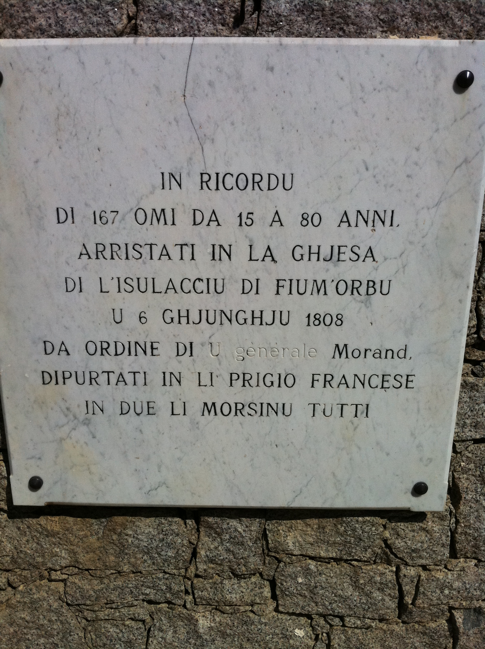 monument Isolaccio di fiumorbo